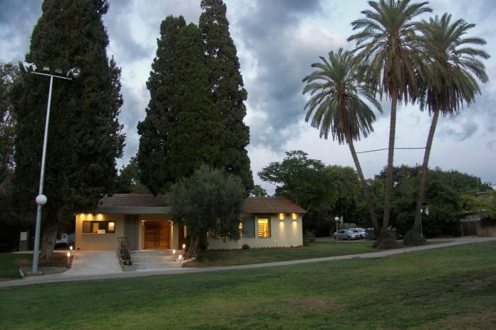 מועדון לחבר וחדר הנצחה לאורי אילן וכל הנופלים בקיבוץ גן-שמואל